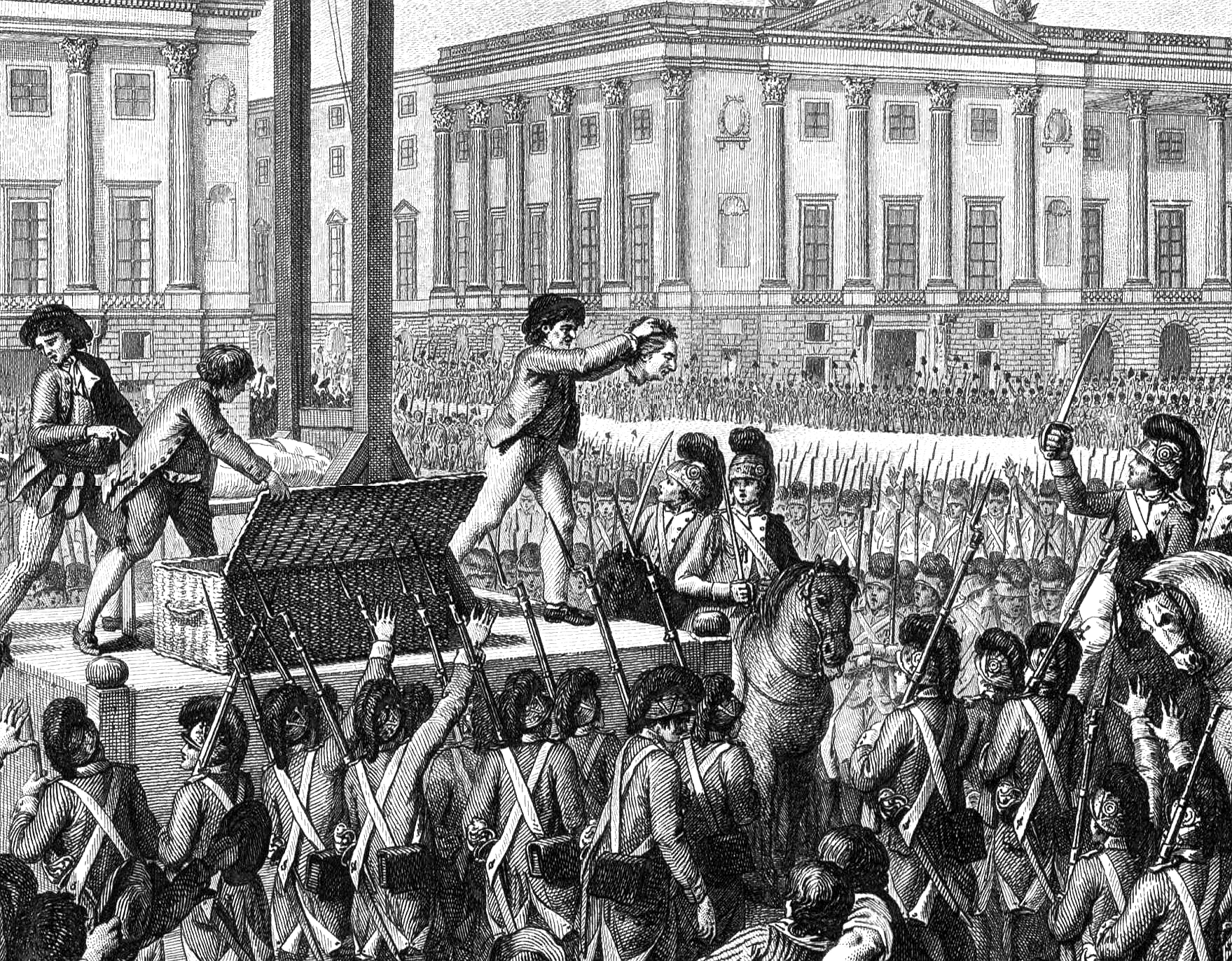 Journée du 21 janvier 1793 la mort de Louis Capet sur la place de la Révolution : présentée à la Convention nationale le 30 germinal par Helman